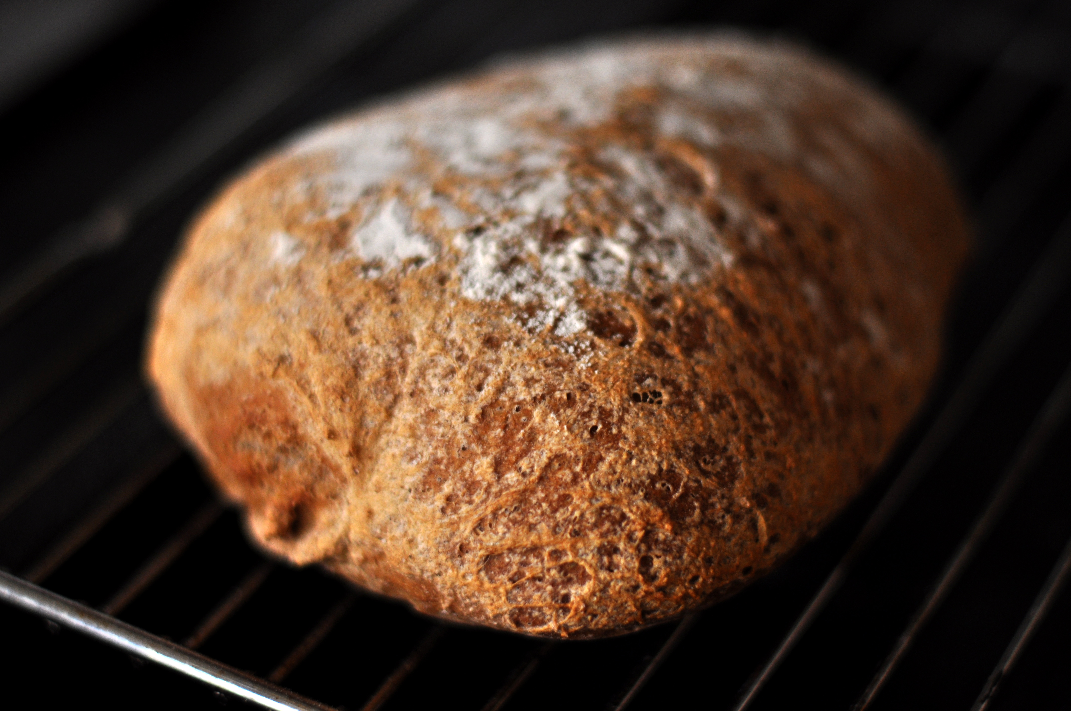 Ølandshvedebrød